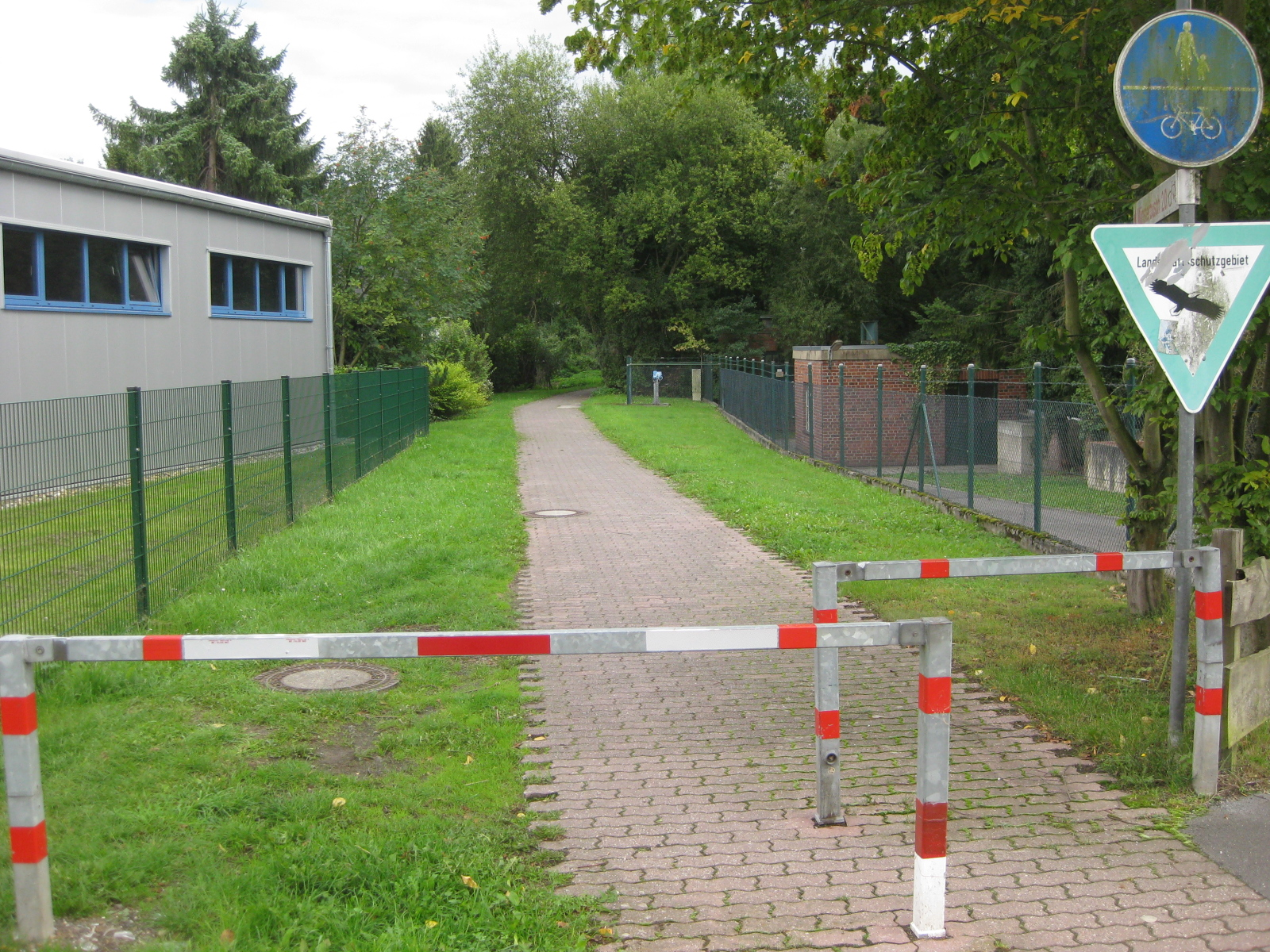 Überbleibsel der Trasse der Bahnstrecke Stolberg–Münsterbusch in Stolberg (Rhld.)